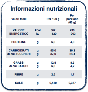 L'etichetta è conforme a quanto previsto dal Regolamento 1169/2011